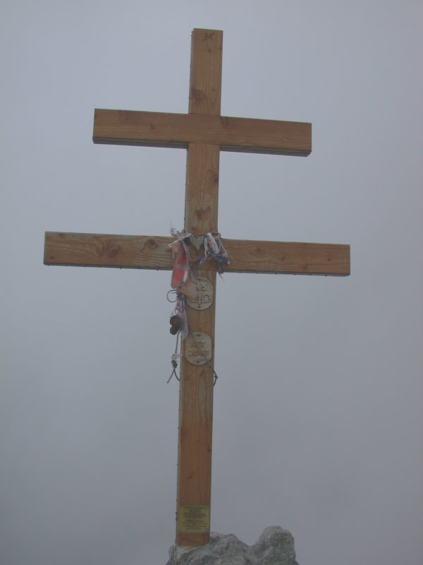 Krzyż na szczycie Krywania - znak niepodległej Słowacji.